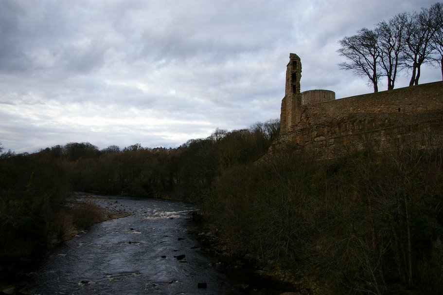 River Tees bei Barnard Castle